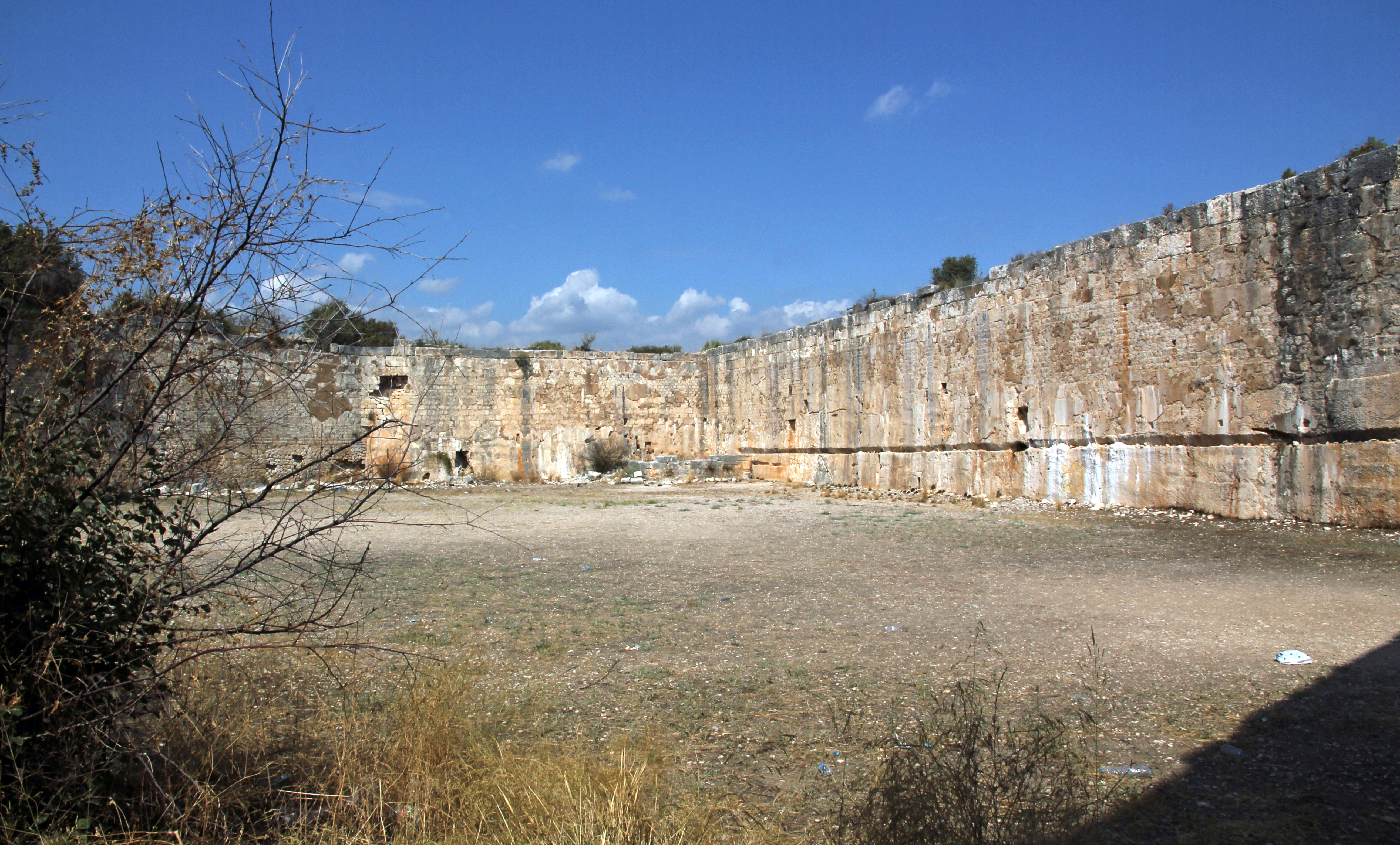 Korykos, archäologischer Fundort in der Südtürkei, Große Zisterne